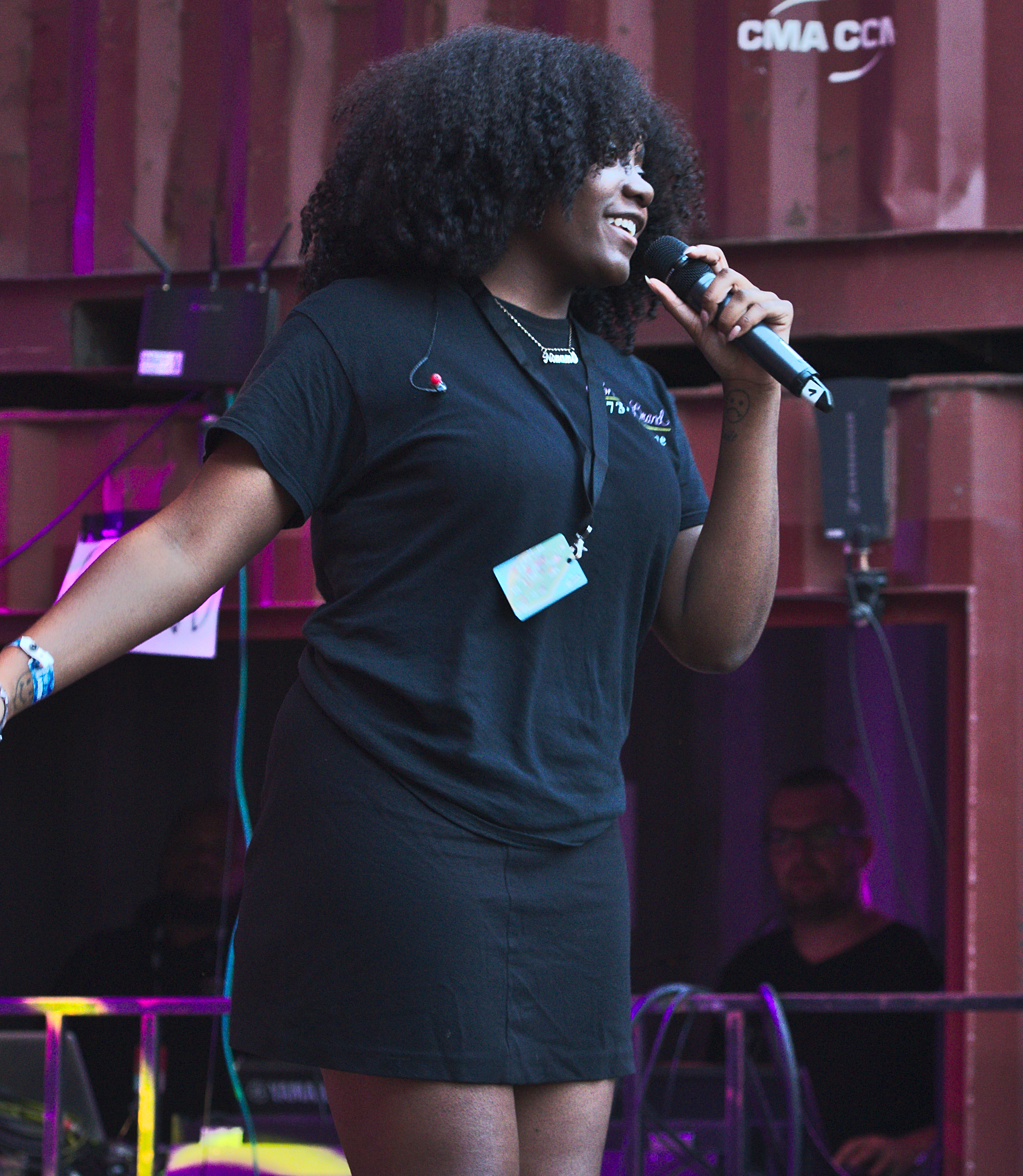 Die US-amerikanische Rapperin Noname beim splash! Festival 20 (2017).